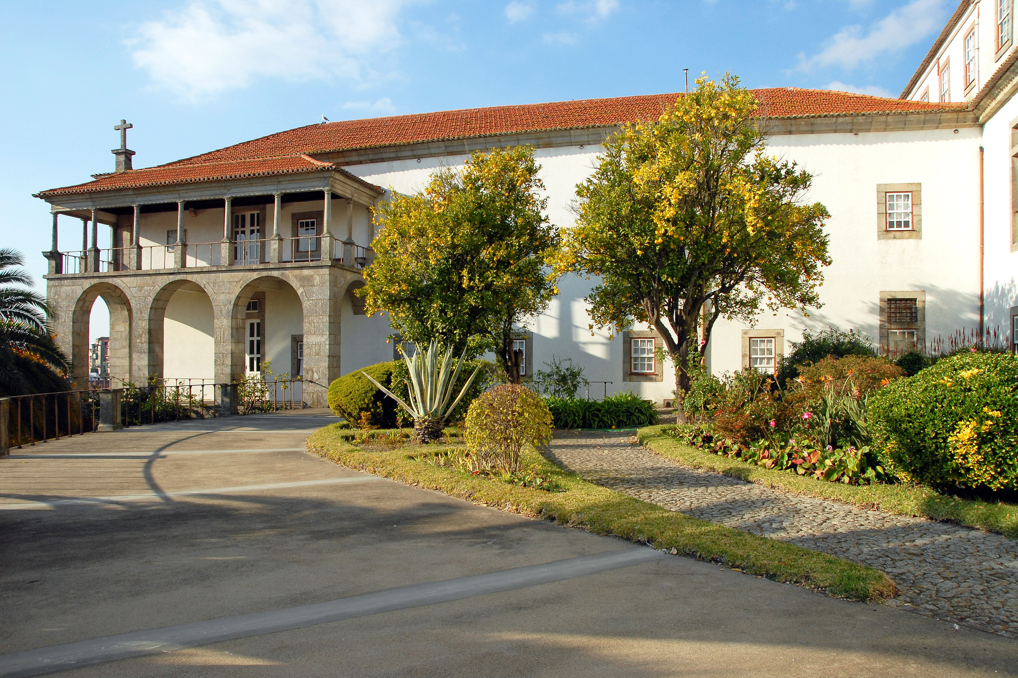 Igreja e Colégio de São Lourenço ou Igreja dos Grilos ou Seminário Maior da Sé do Porto This file was uploaded for Wiki Loves Monuments in Portugal with the unique identifier 70400.